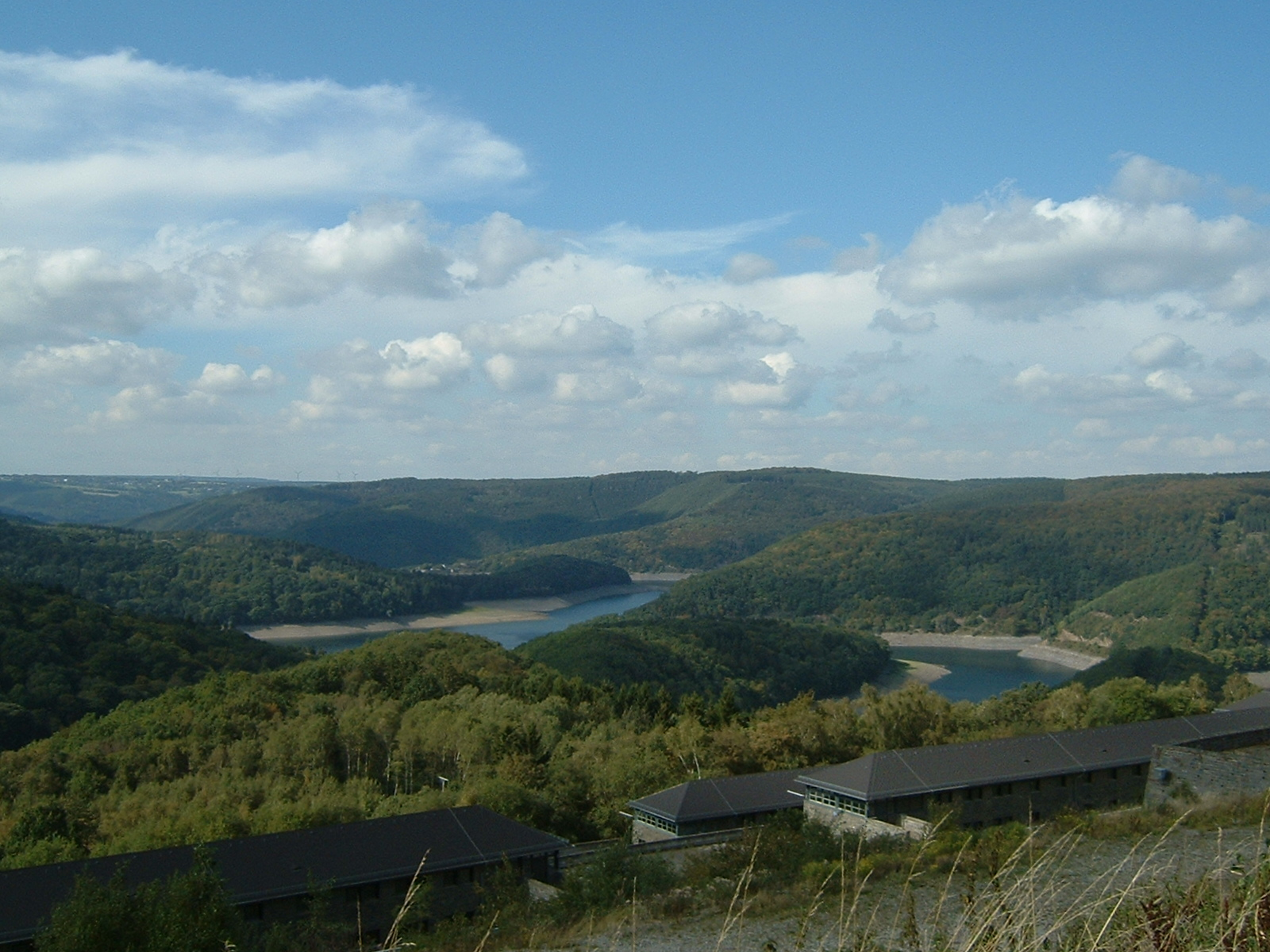 Burg Vogelsang Sommer 2004 Fahrradtour Christian Hilberath & Rainer Hilberath Bild:Blick_von_Burg_Vogelsang_auf_Tal.JPG 21:36, 14. Jan 2006 . . Chilberath (Diskussion) . . 1600 x 1200 (698642 Byte) (Burg Vogelsang, Sommer 2004 Fahrradtour Christian Hilberath & Rainer Hilberath)